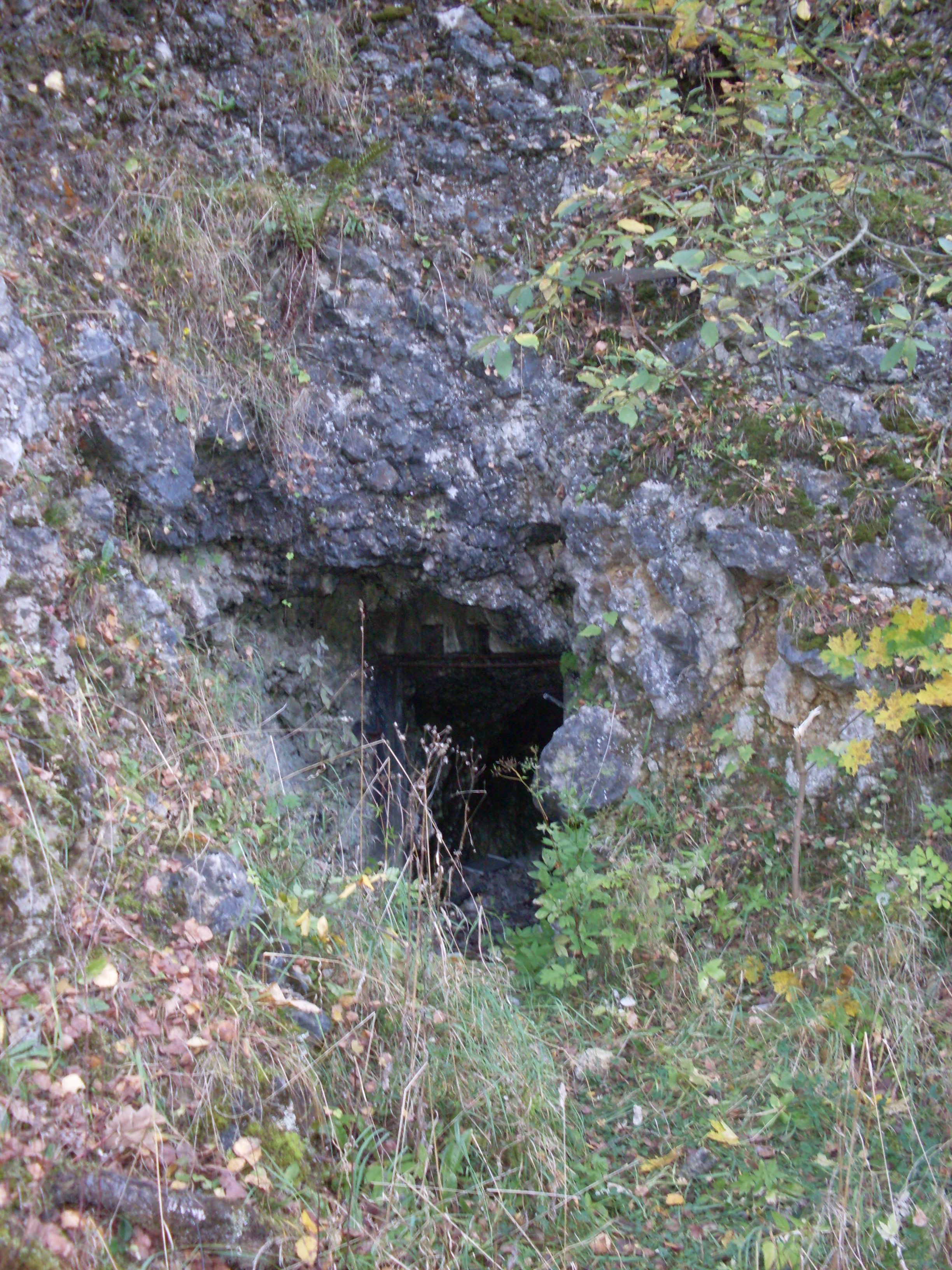 Krzeszowice.Gwoździec.Stara Sztolnia zasypany szyb